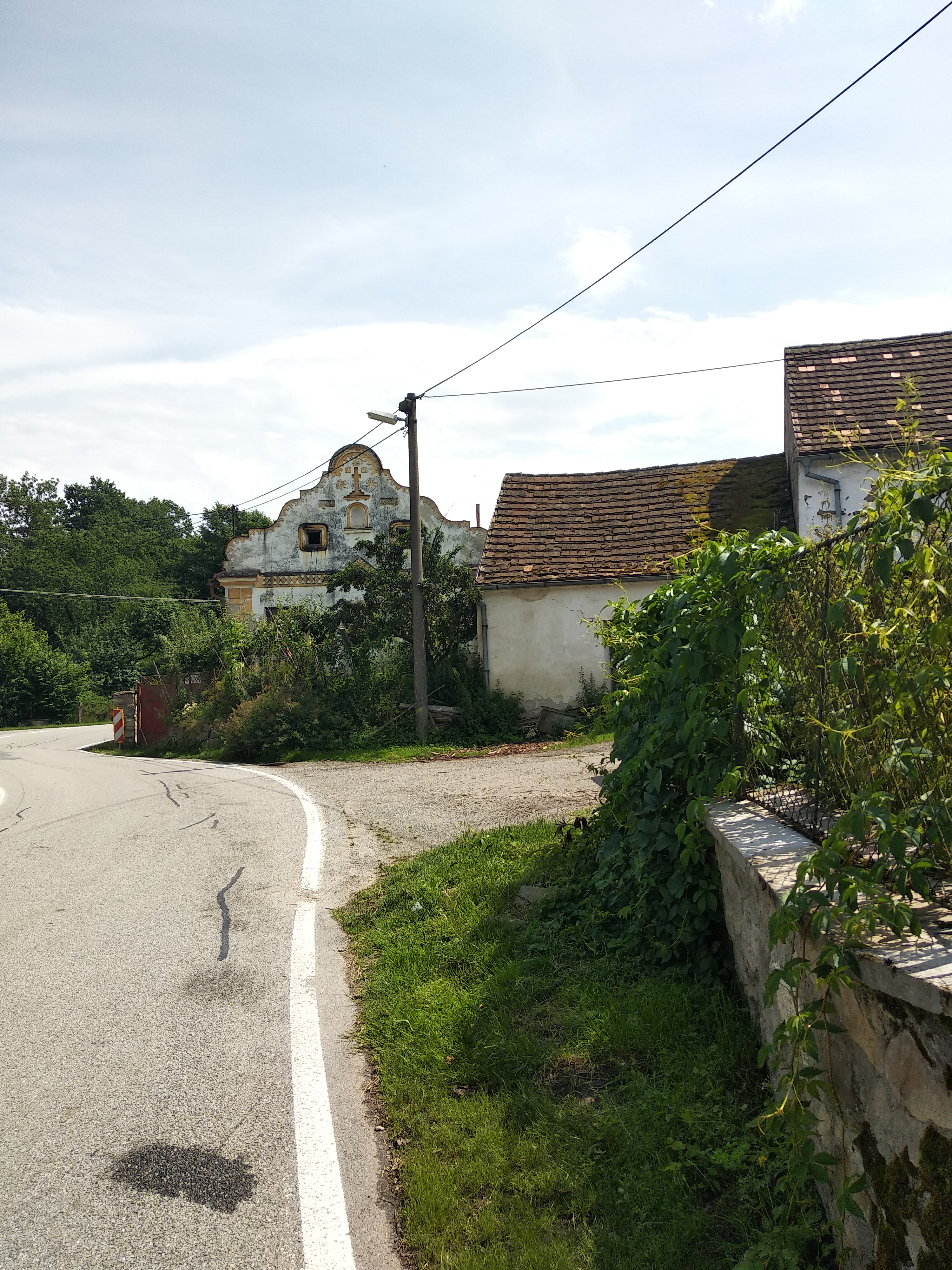 Fotografie z vesnice Milíkovice v jižních Čechách, okres Strakonice